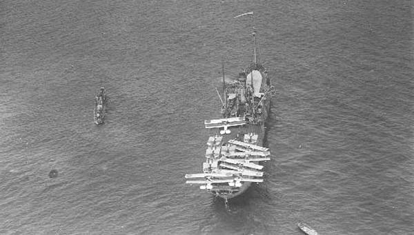 "Estación Transportable de Aeronáutica Naval". Buque Dédalo en la Bahía de Alhucemas fotografiado desde un aeroplano francés el 8 de septiembre de 1925.